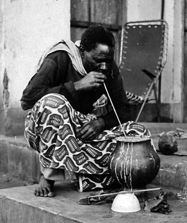 Dr. Thoden van Velzen werkte in het Malila dorp Ibala dat aan de zuidelijke rand van Umalila in het Ulambya district (Bulambia) lag. Hij deed hier in 1966-1968 veldonderzoek met P.M. Van Hekken voor hun studie naar landschaarste en rurale gelijkheid in het toenmalige Rungwe district (Walsh, 1998)